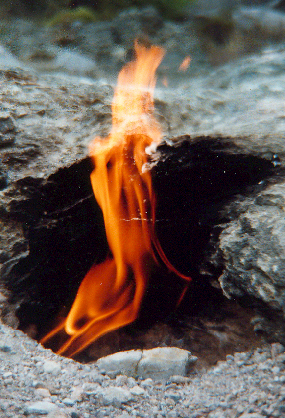 Chimaira: Gas entzündet sich in Verbindung mit Sauerstoff an der Erdoberfläche